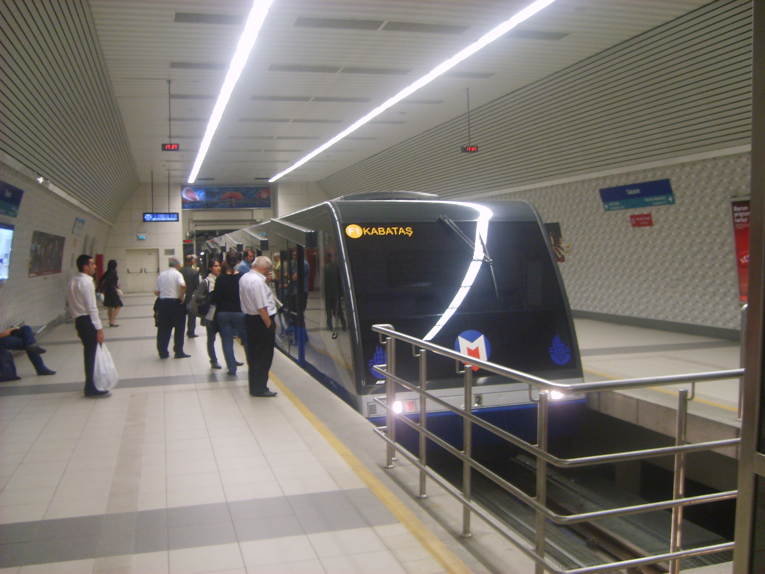 Taksim-Kabataş füniküler aracı